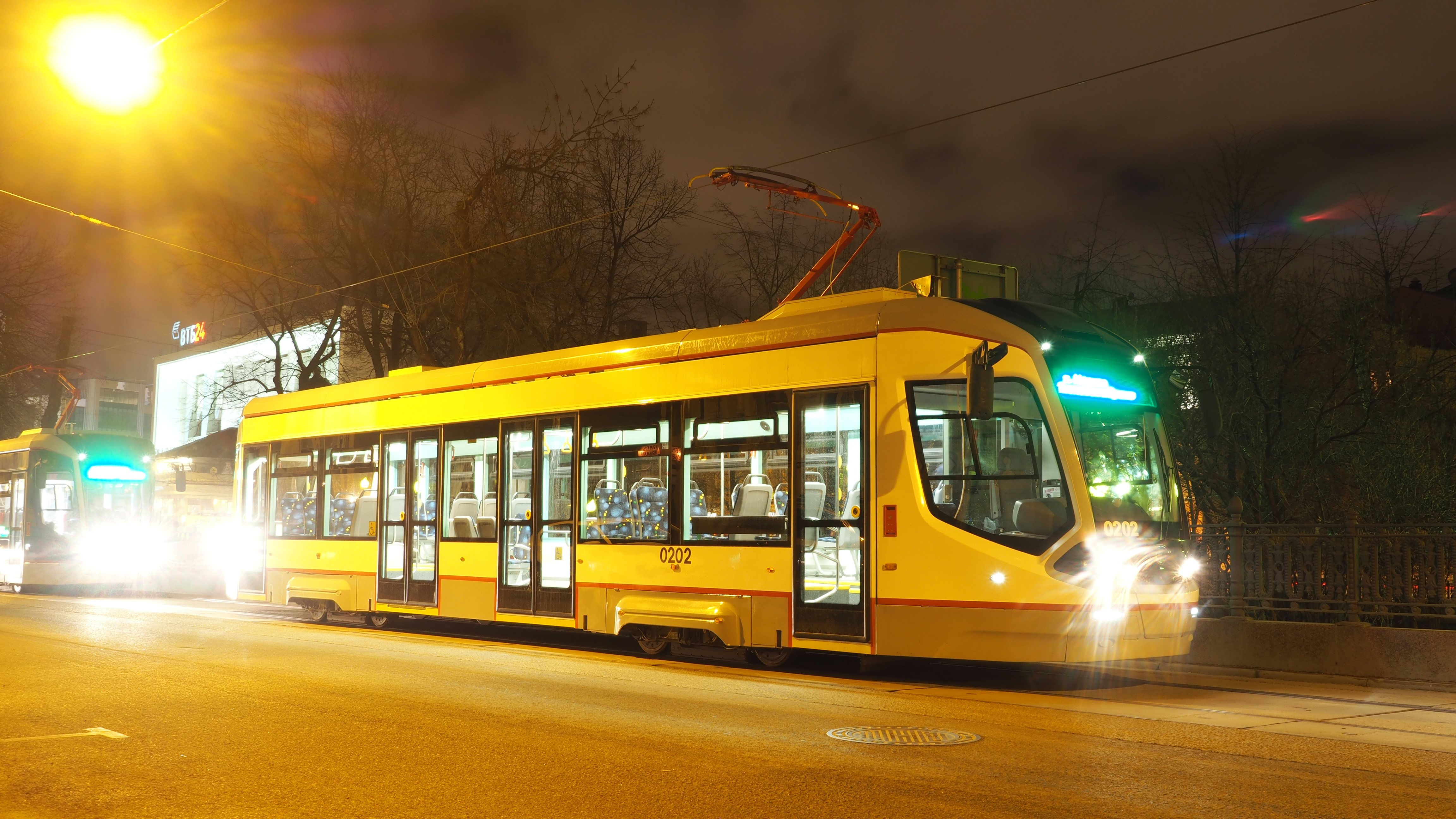 Night test before tram parade at anniversary of tram service in Moscow. Ночная репетиция трамвайного парада посвящённого годовщине Московского трамвая.